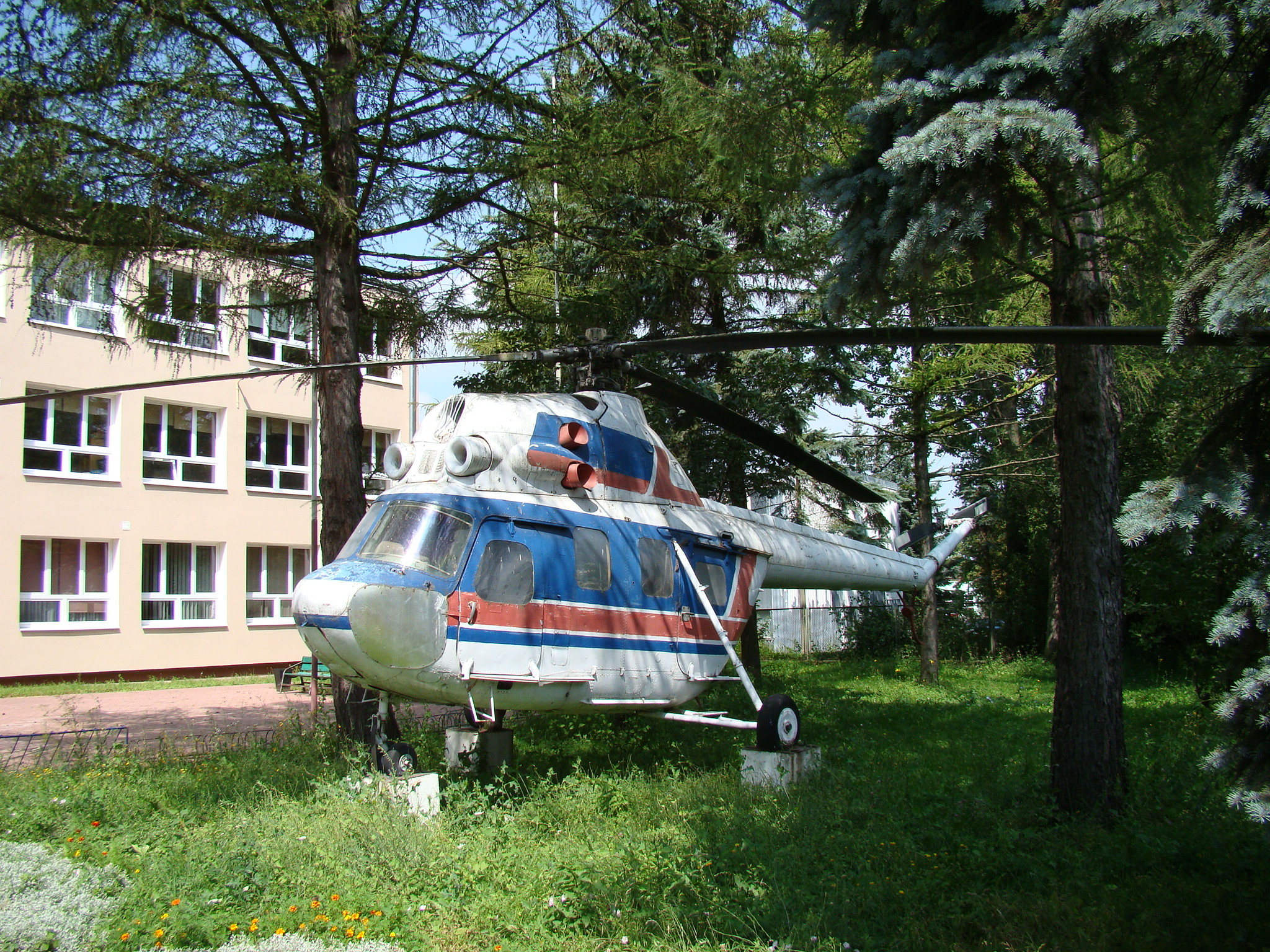 Śmigłowiec Mi-2M przed Powiatowym Centrum Edukacji Zawodowej w Świdniku